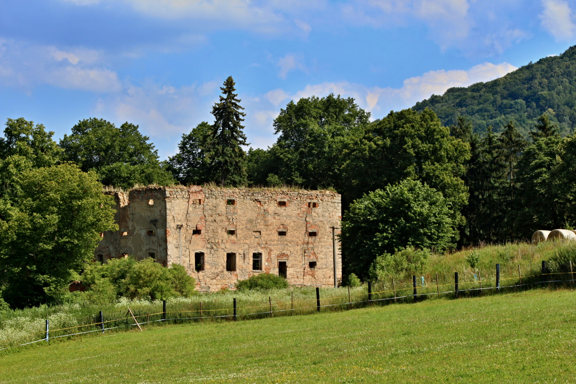 Někdejší tvrz Tlustec ve Velkém Valtinově